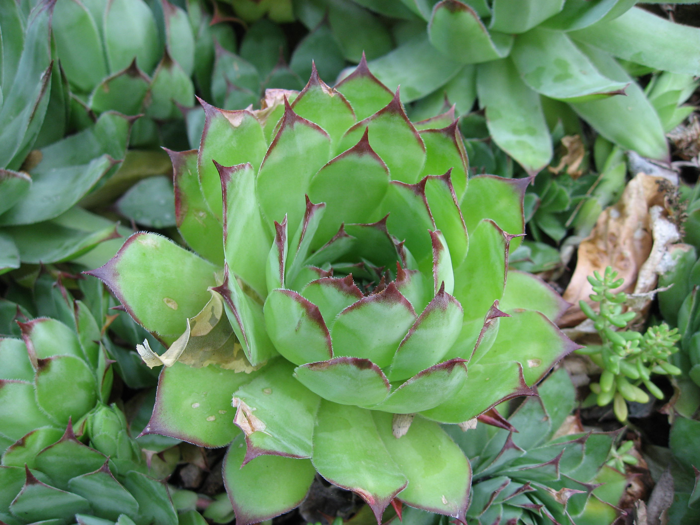 Sempervivum tectorum in Giardino dei Semplici di Firenze Map: 43° 46' 45" N 11° 15' 39" E